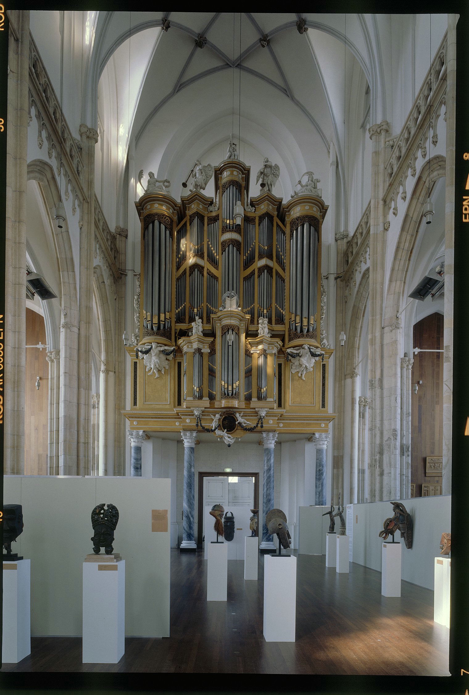 Eusebius- of Grote Kerk (Nederlands Hervormd): Interieur, aanzicht orgel, orgelnummer 97 (opmerking: Gefotografeerd voor Het Historische Orgel in Nederland 1790-1818, bladzijde 108)